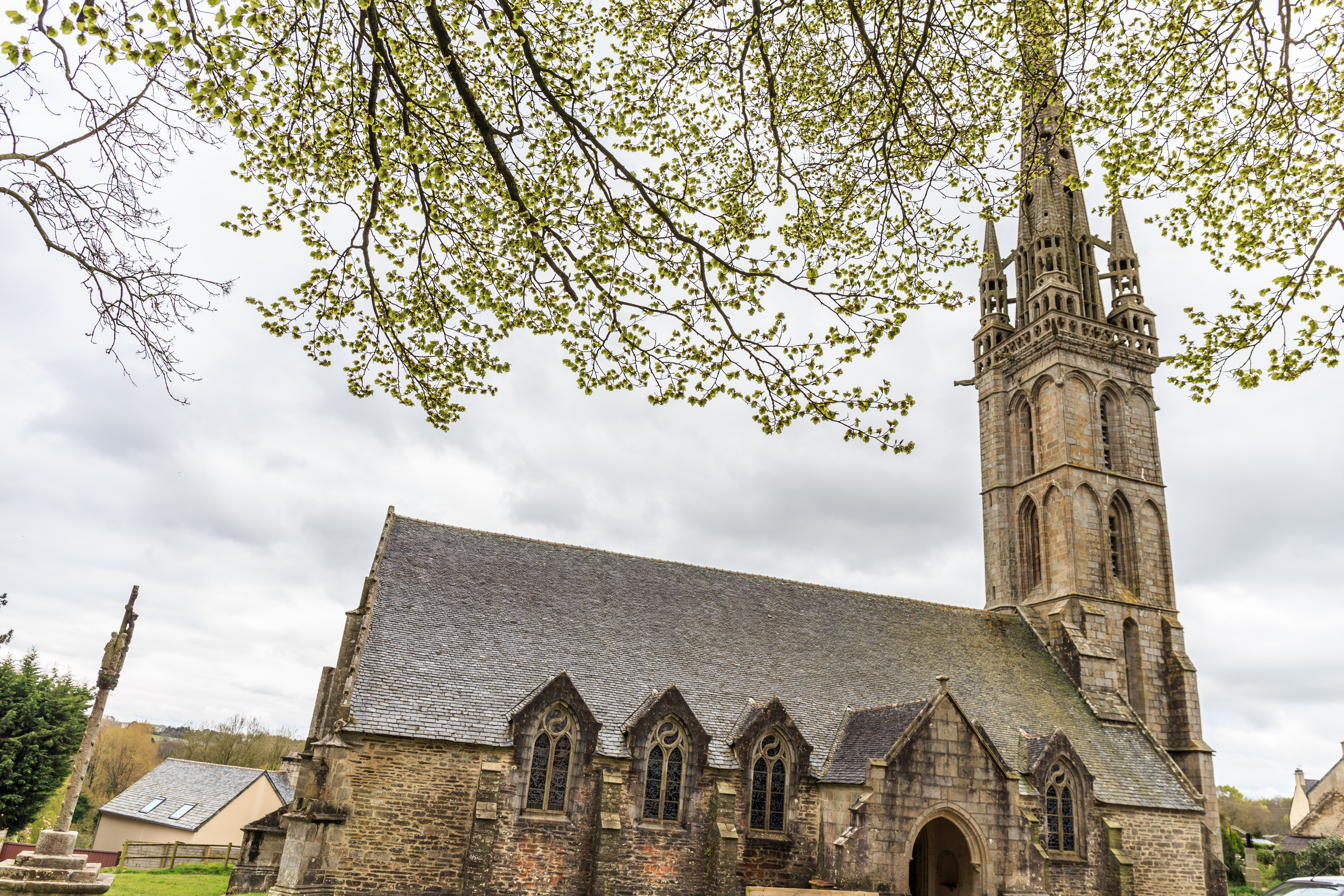 Extérieur de la chapelle Notre-Dame de Lambader en Plouvorn (Finistère, Bretagne).